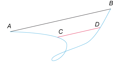 illustration du th des cordes pour une courbe paramétrée